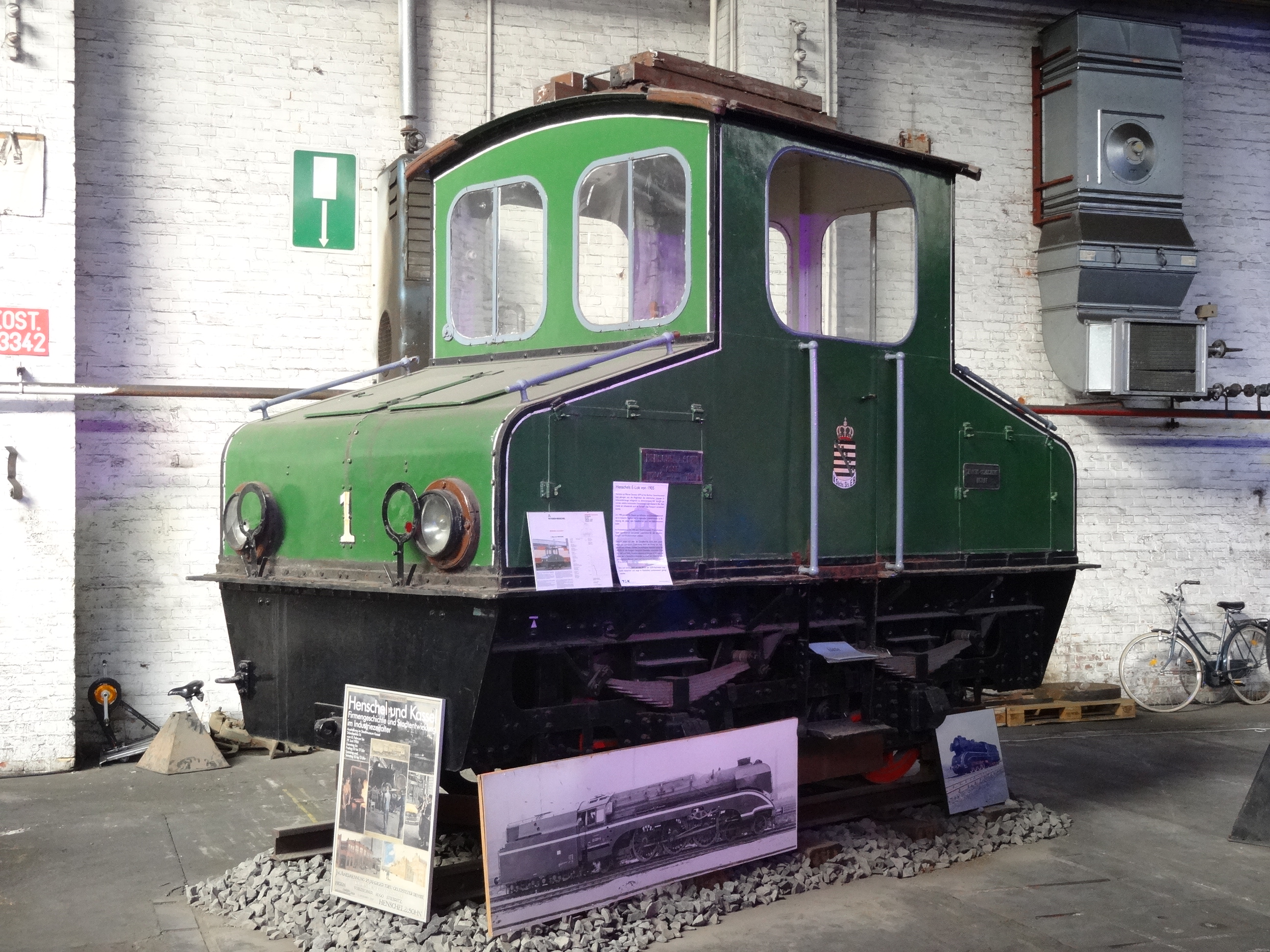 Lokomotive Nr. 1 der Staatlichen Güterbahn Deuben (Freital) im Technik-Museum Kassel